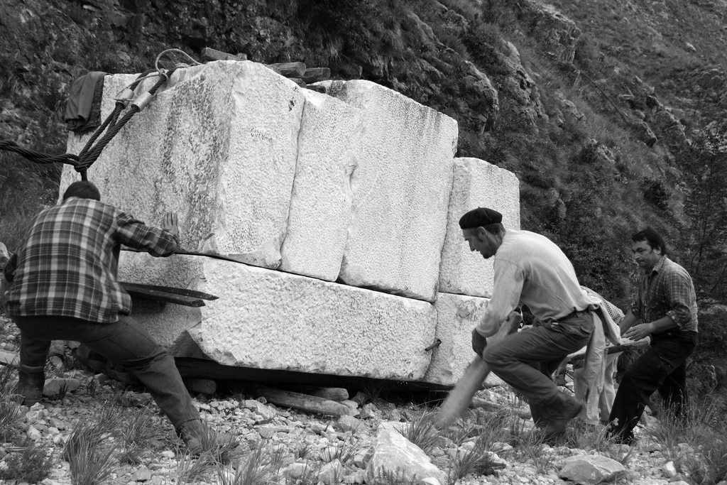 Rievocazione della lizzatura storica; tecnica tradizionale usata dai cavatori per trasportare a valle i blocchi di marmo estratti sulle montagne delle Alpi Apuane in Toscana – Italia.